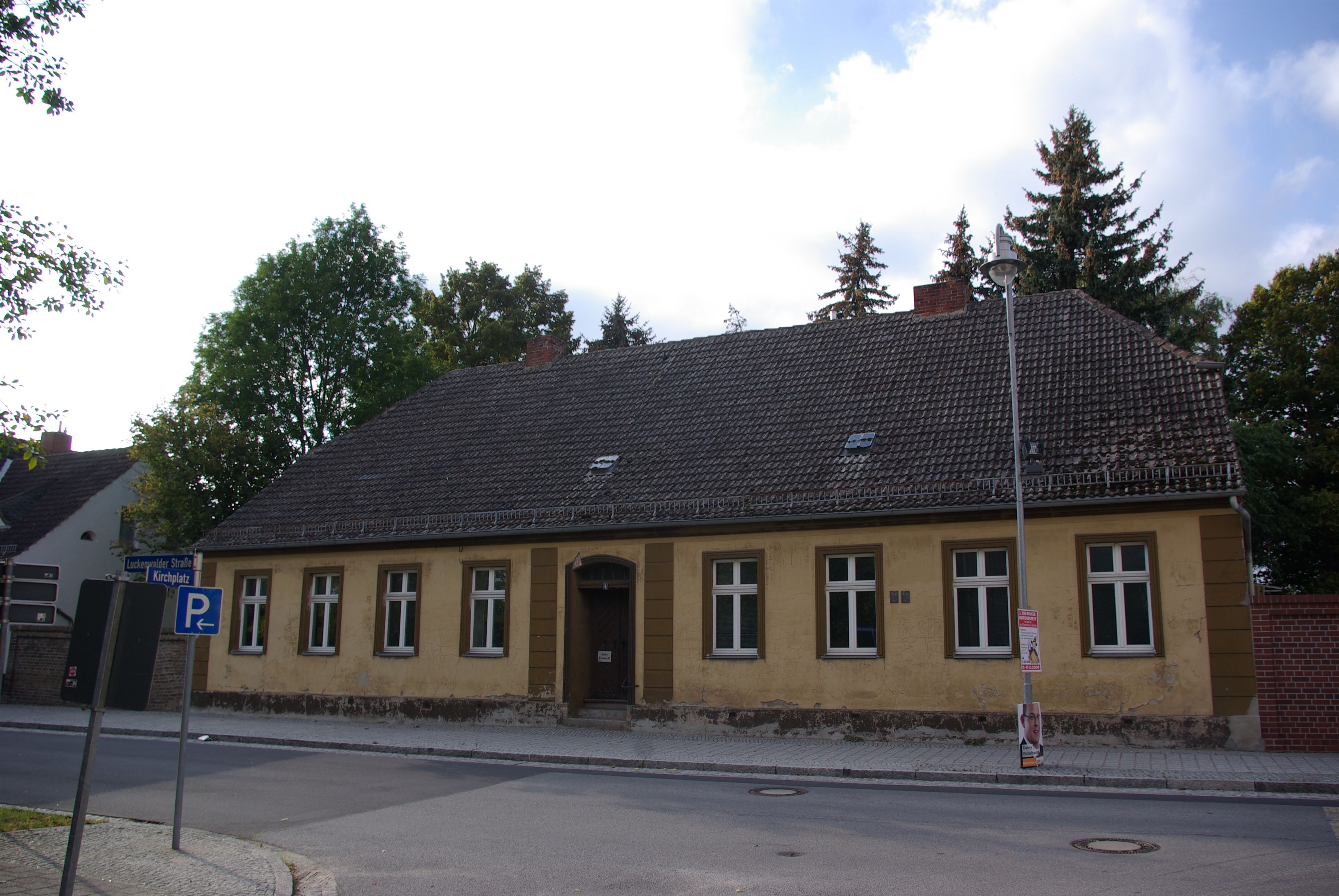 Trebbin in Brandenburg. Das Wohnhaus in der Luckenwalder Straße 4 steht unter Denkmalschutz. Es steht schräg gegenüber der Stadtkirche St. Marien.